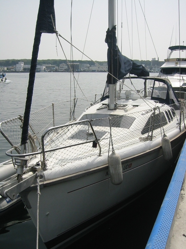 A sailboat docked in Misaki, Kanagawa, Japan